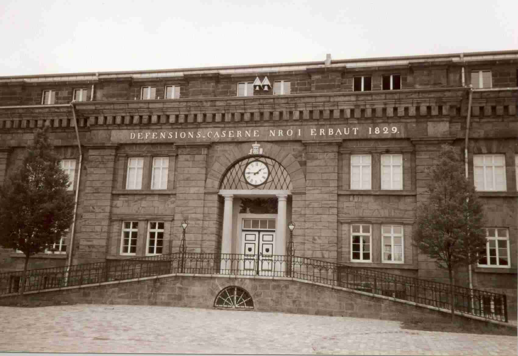 Das Hauptgebäude des Preußenmuseums in Minden, Nordrhein-Westfalen. Das heute als Museum genutzte Gebäude am Simeonsplatz war einst die Defensionskaserne und war Teil der Festung Minden. Die Inschrift über dem Portal lautet: DEFENSIONS-CASERNE NROI ERBAUT 1829